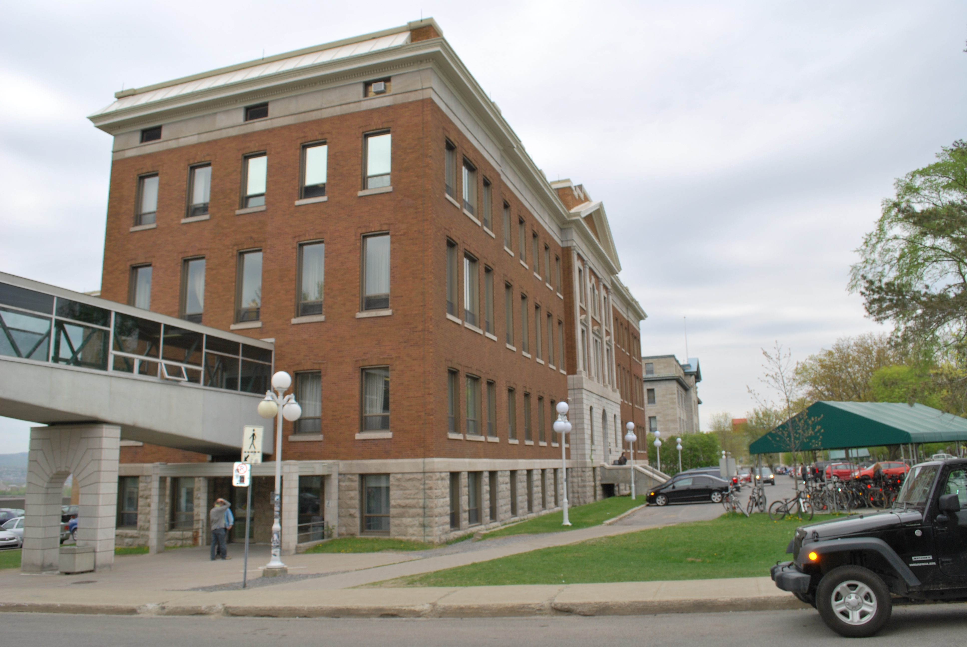 Pavillon du Collège François-Xavier-Garneau, à Québec.